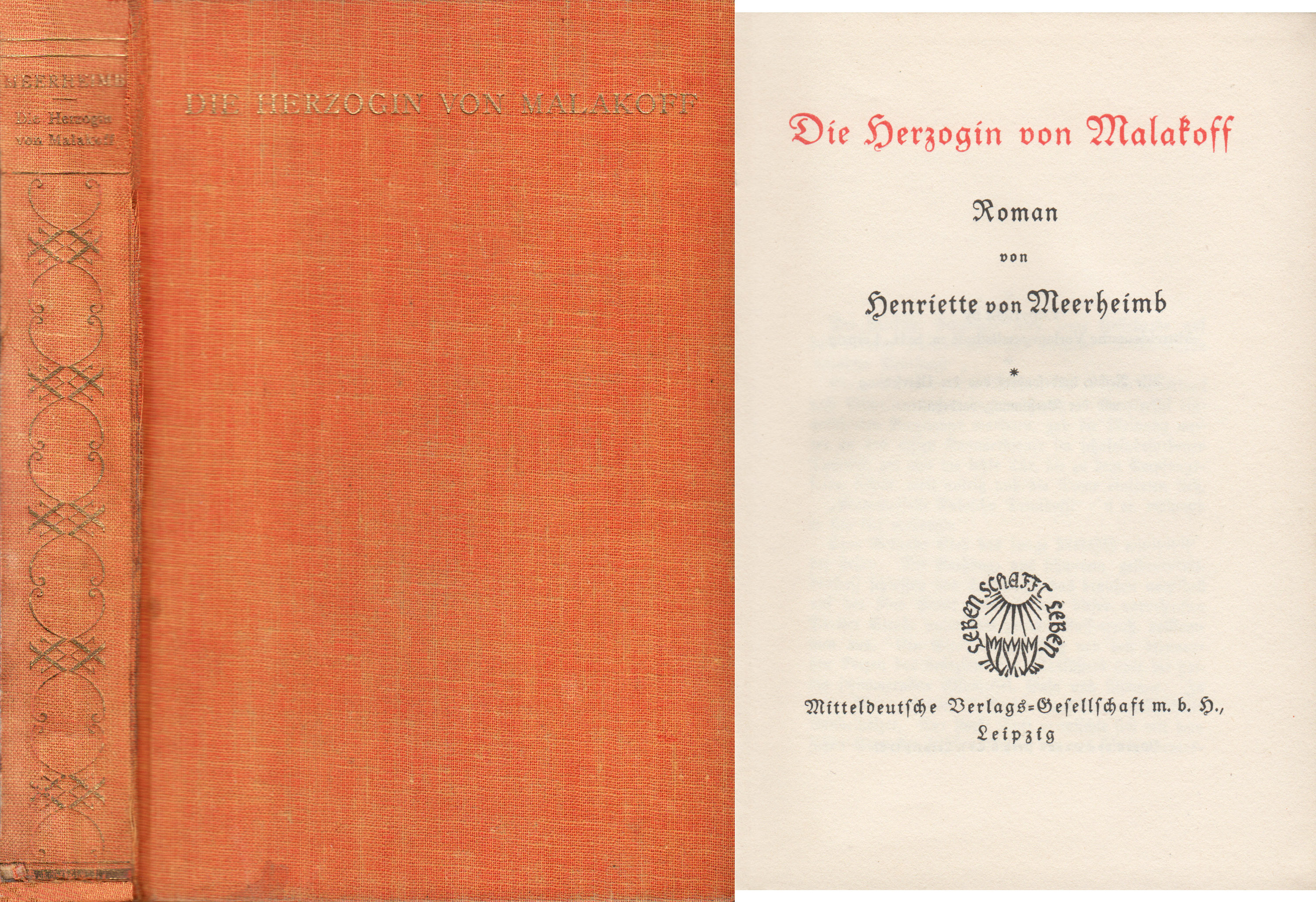 Historischer Roman Die Herzogin von Malakoff, Autorin Henriette von Meerheimb, erschienen in der Mitteldeutschen Verlagsgesellschaft (das Buch enthält keine Auflagenhöhe und kein Erscheinungsjahr), der Roman hat 288 Textseiten.